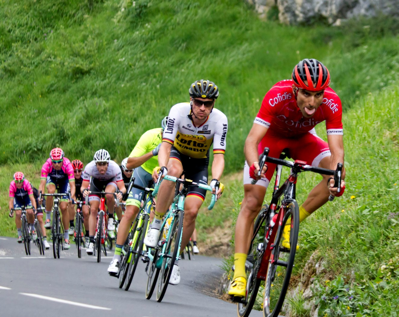 9264 cofidis tong uit bek